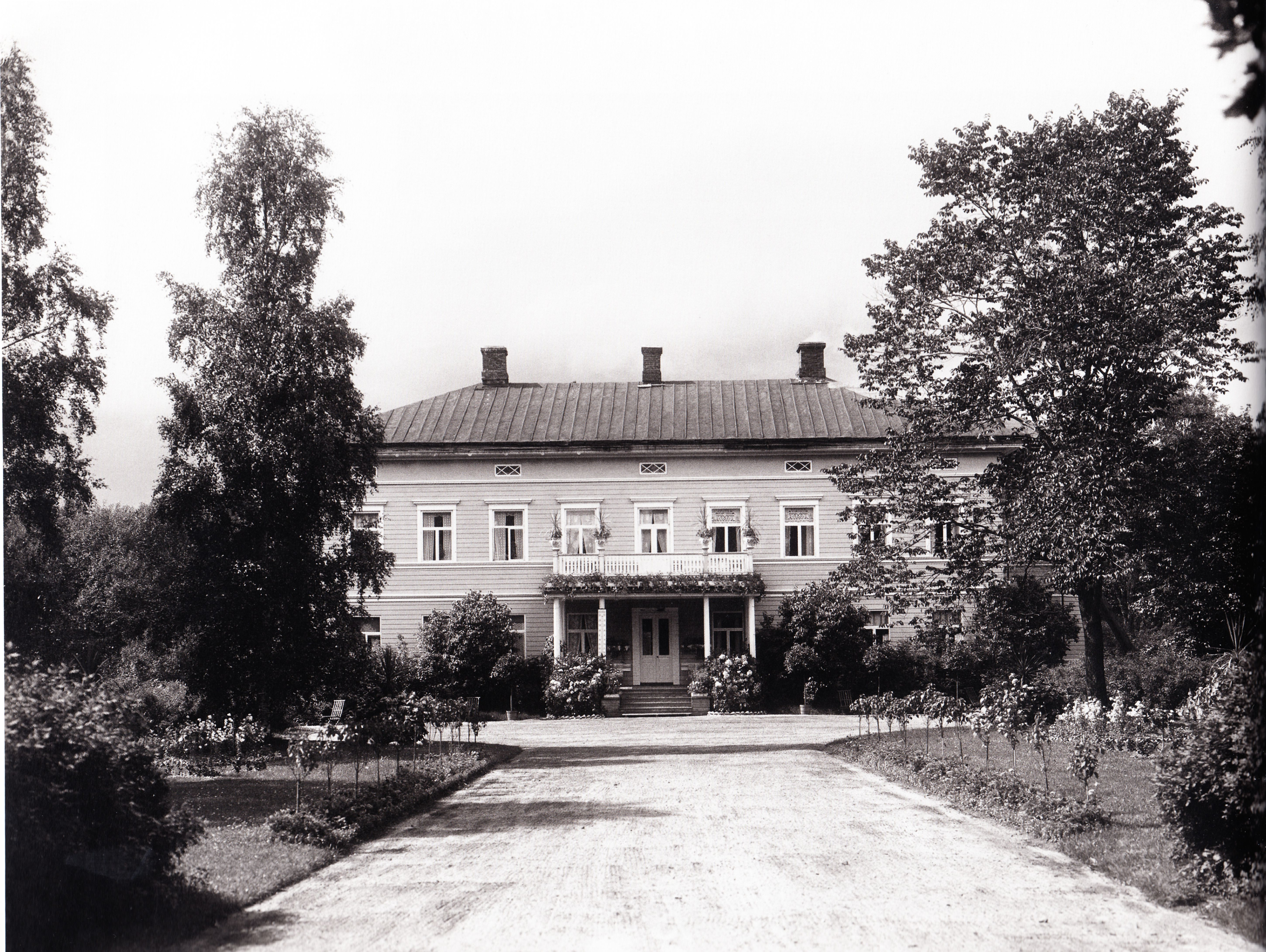 Anolan kartano